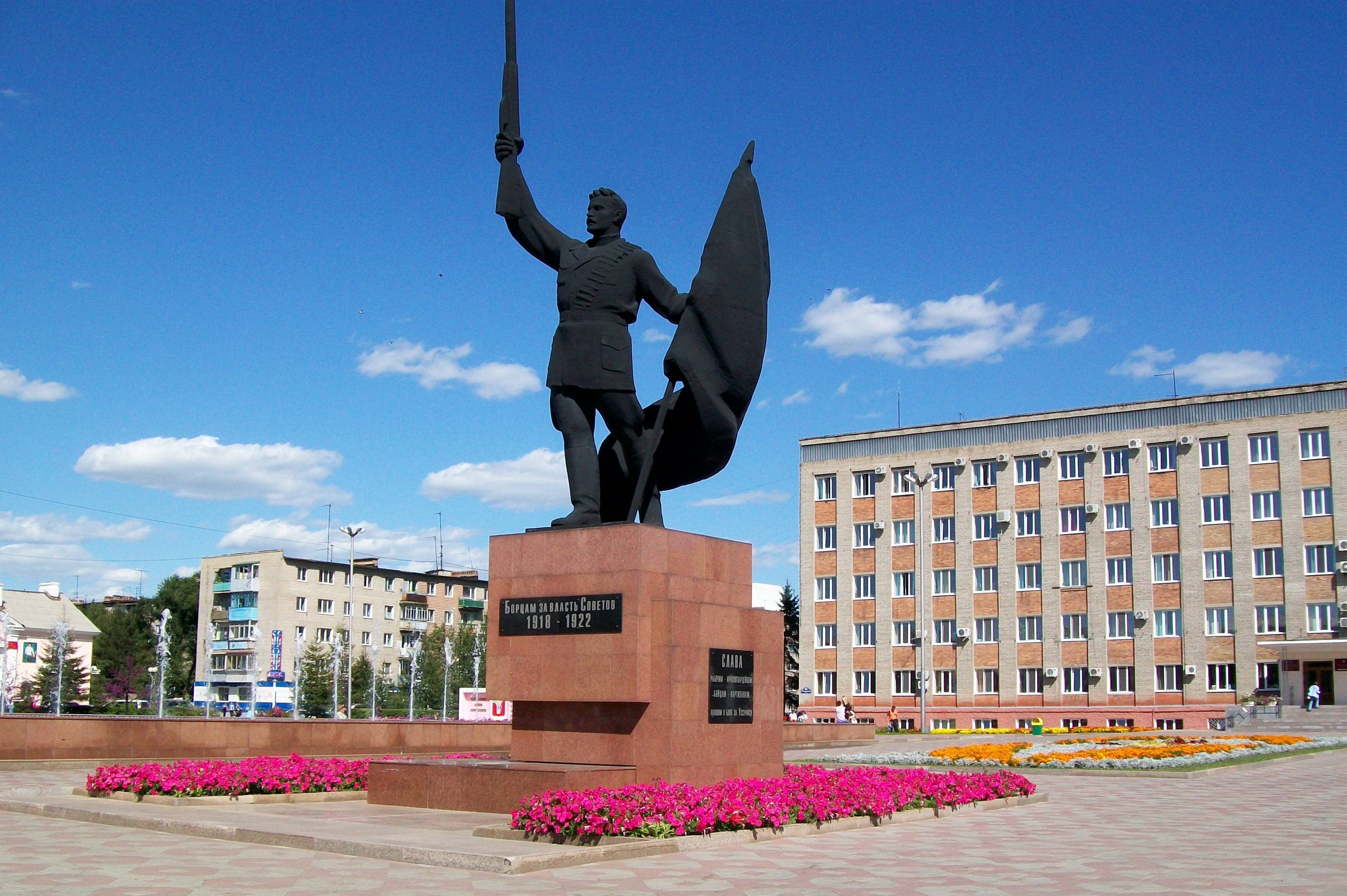 Памятник борцам за власть Советов: площадь Центральная, Уссурийск, Приморский край